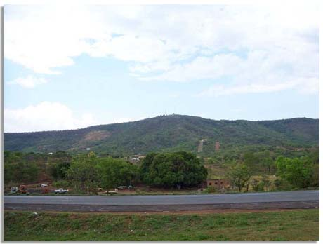 Serrado estrondo Paraíso do Tocantins